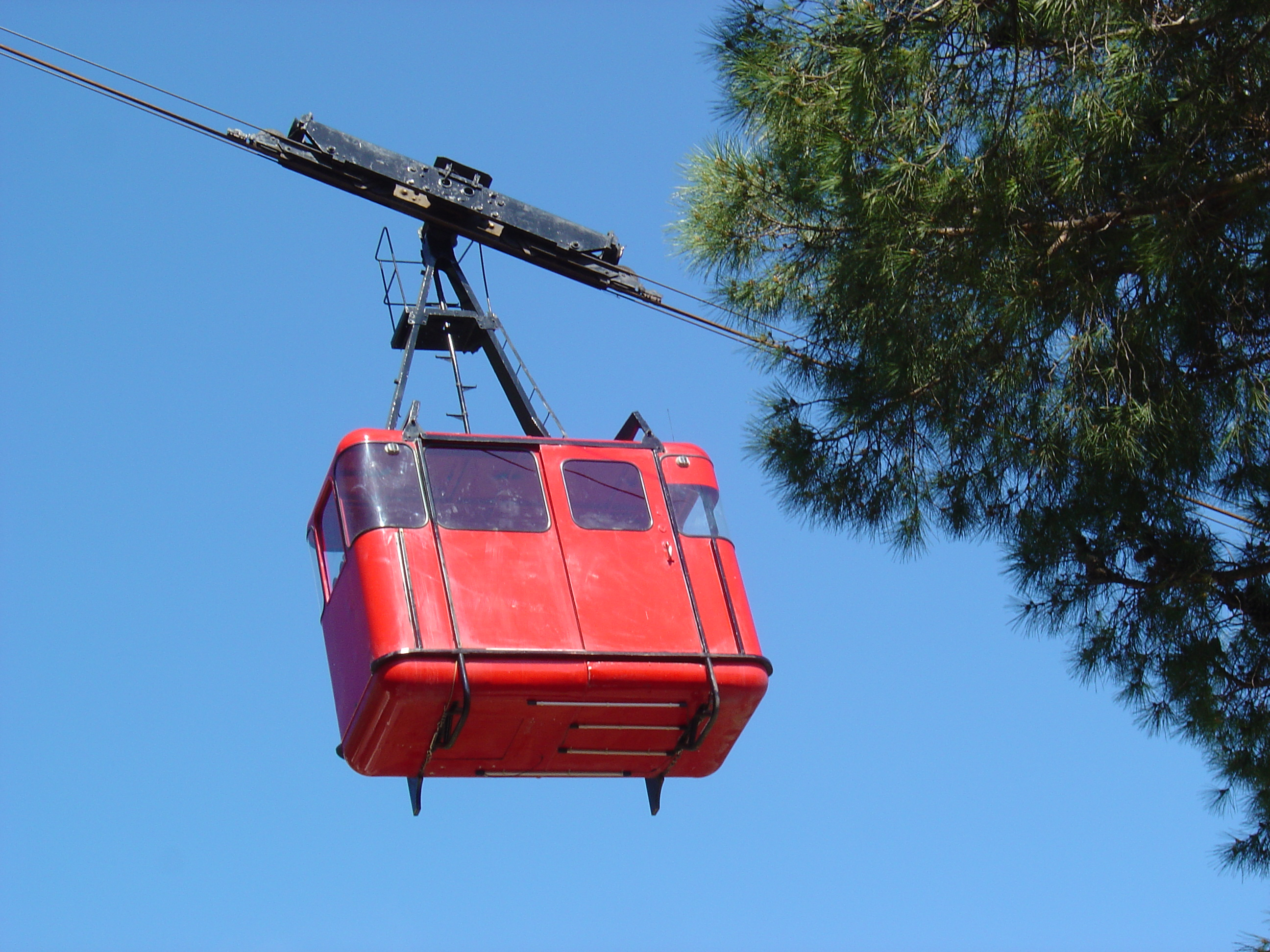 Téléphérique de Toulon ( mis en service le 12 juin 1959 -Fabriqué par la société Heckel